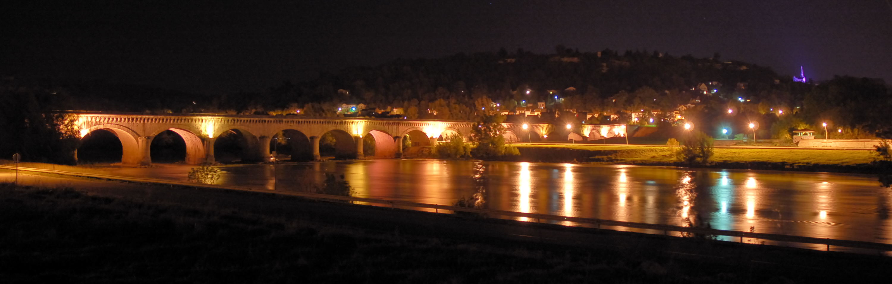 Panorama du pont canal d'Agen